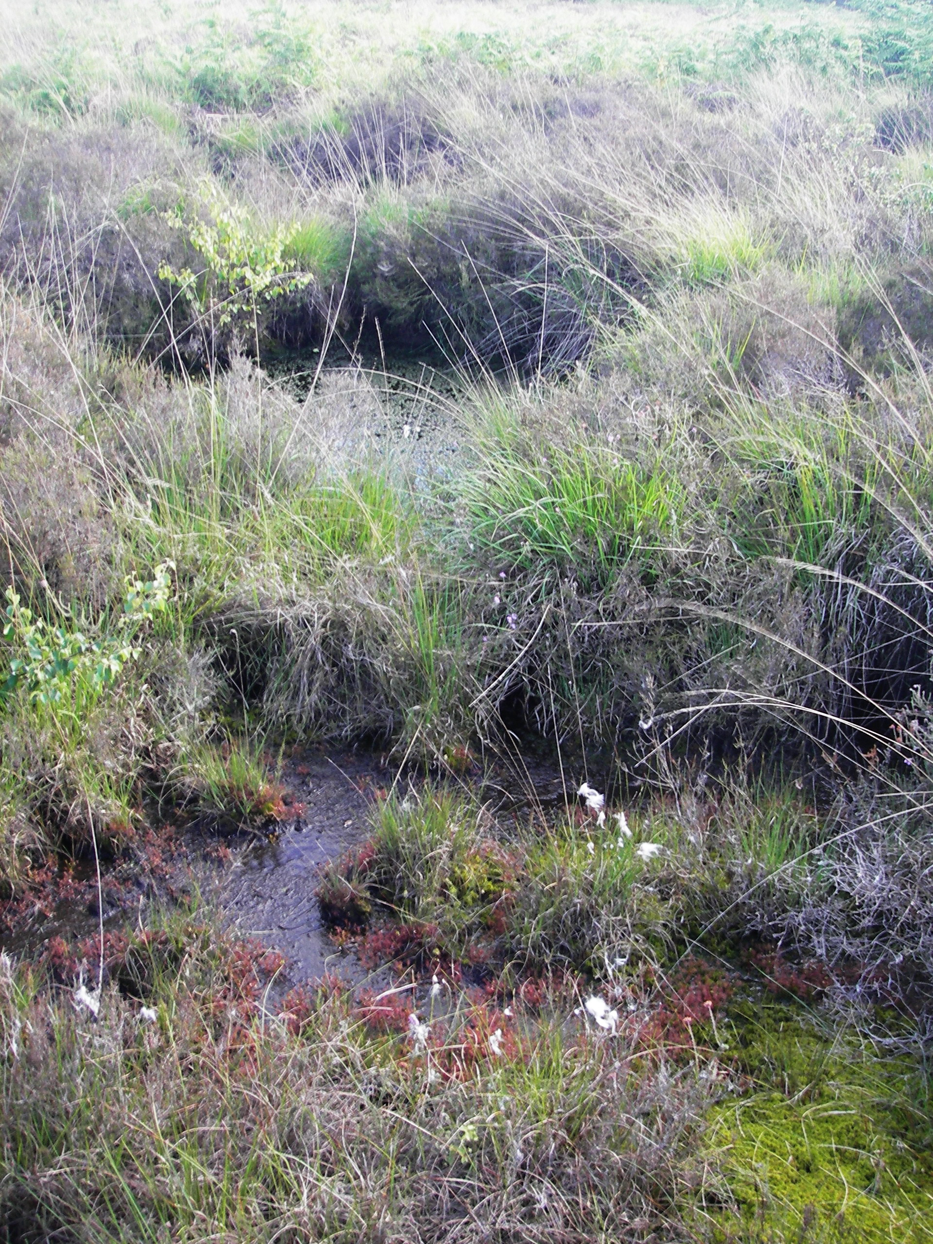 Turfgat of boerenkuil bij Liessel.